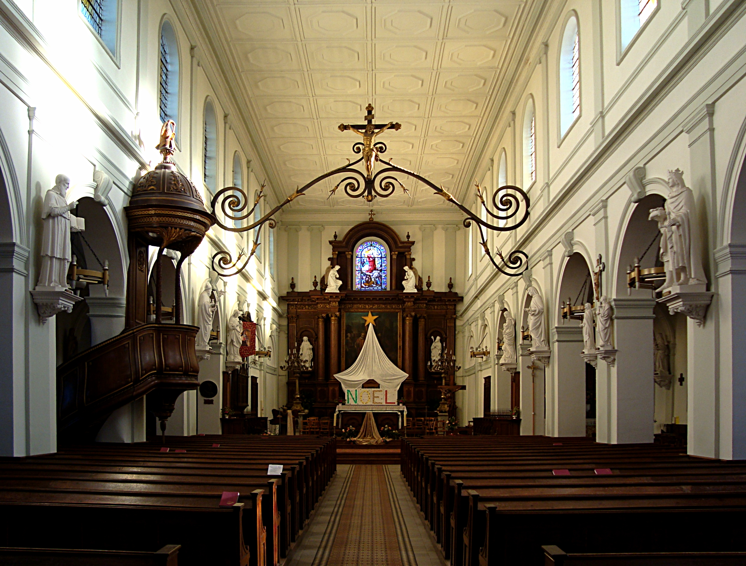 La nef de l'église de Saint-Romain-de-Colbosc (Seine-Maritime).